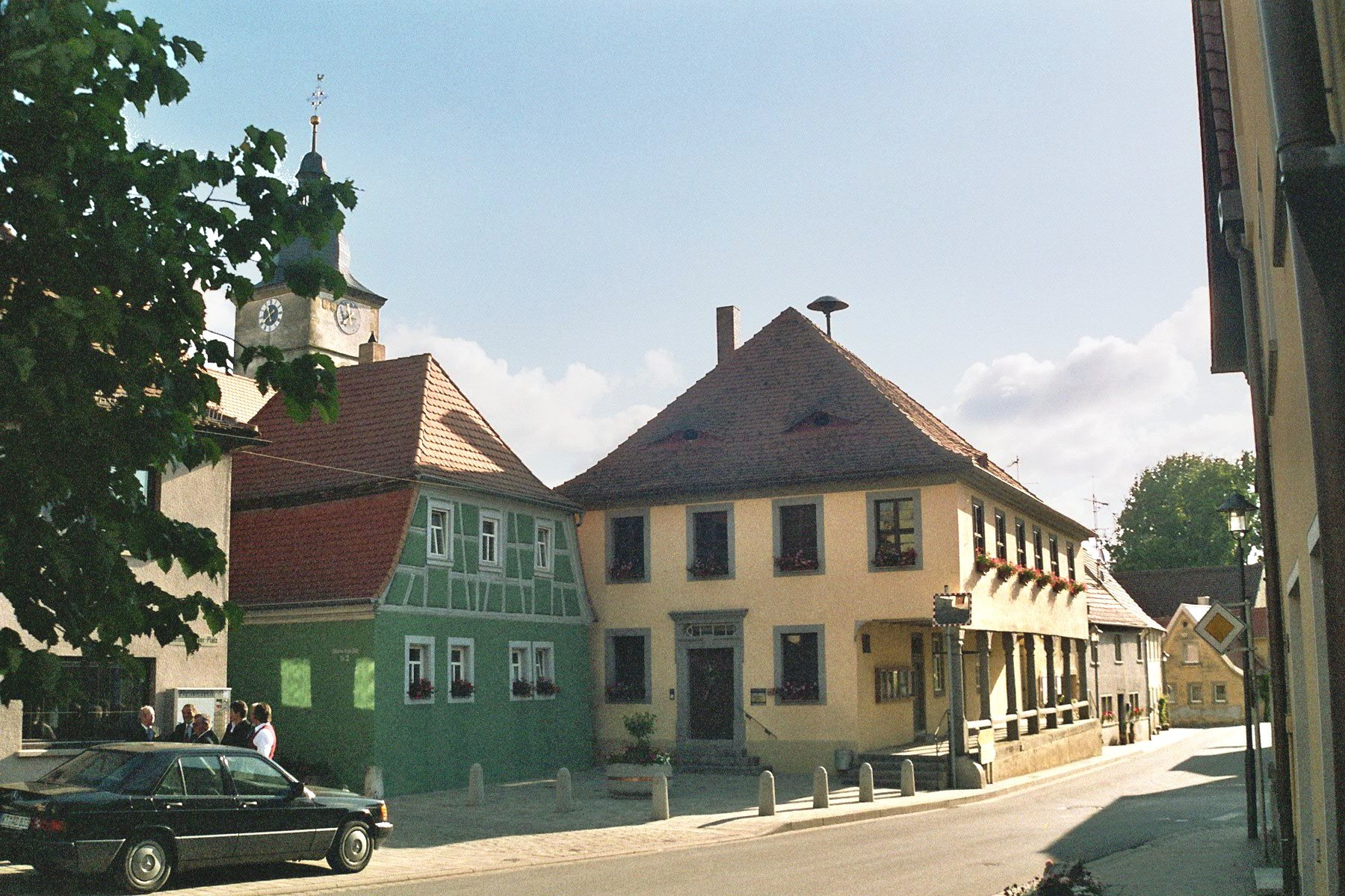 Rathaus Kleinlangheim, Bayern, Deutschland. Urheber: Roland Bergmann Dipl. Ing. (FH) Architekt Erstellungsdatum: 23.06.2005 selbst erstellt: ja, für die GNU-FDL oder für Public Domain als Lizenzangabe